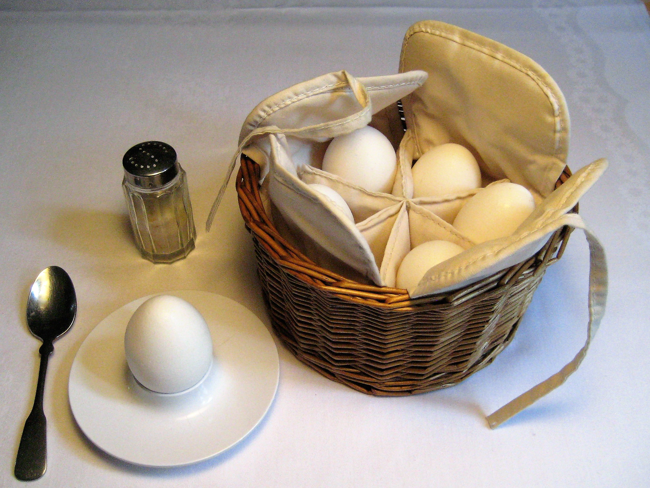 „Eierwärmer-Körbchen“ für bis zu 6 (gekochte) Eier.